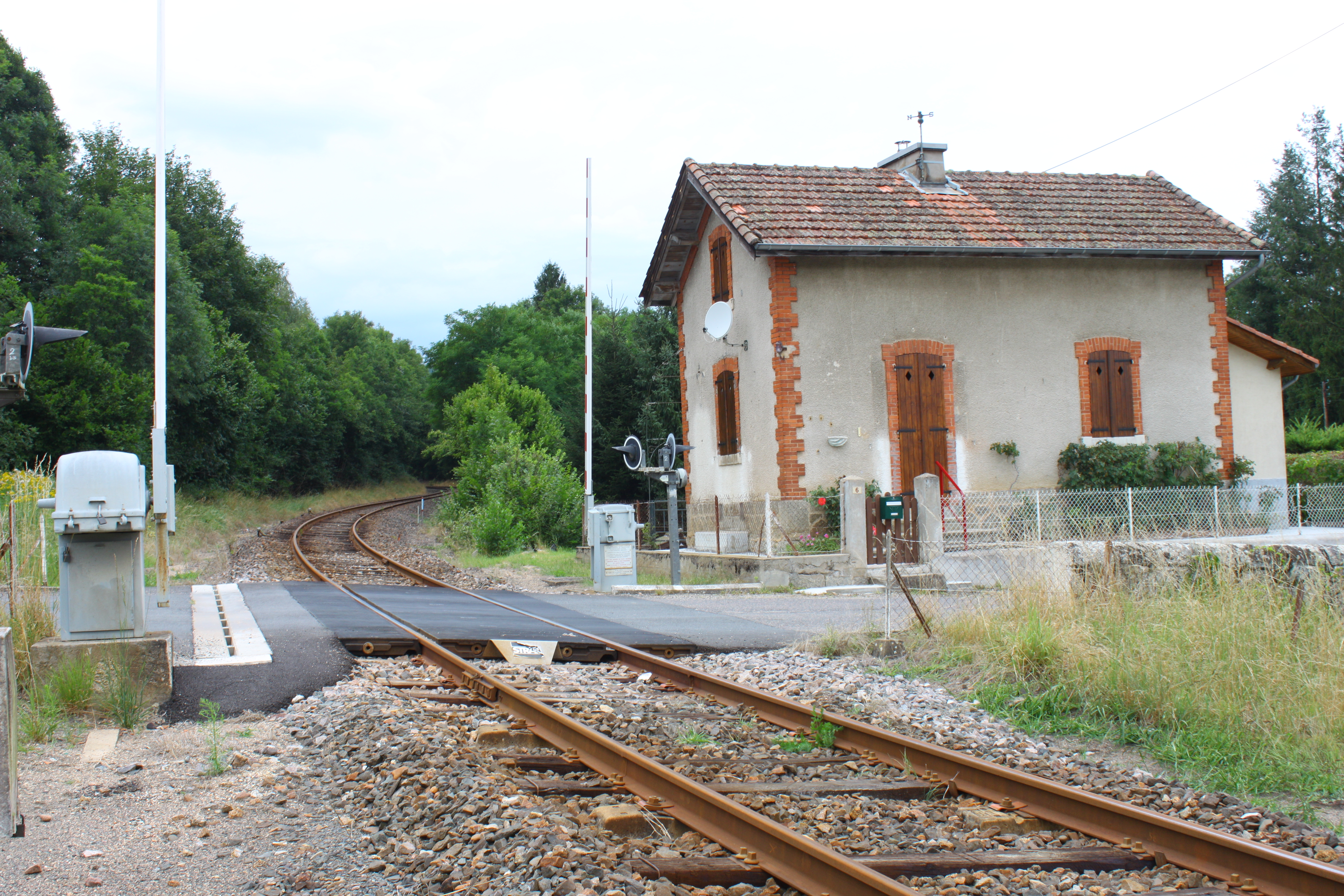 Passage à niveau 61 à Saint-Julien-la-Vêtre sur la Ligne de Clermont-Ferrand à Saint-Just-sur-Loire